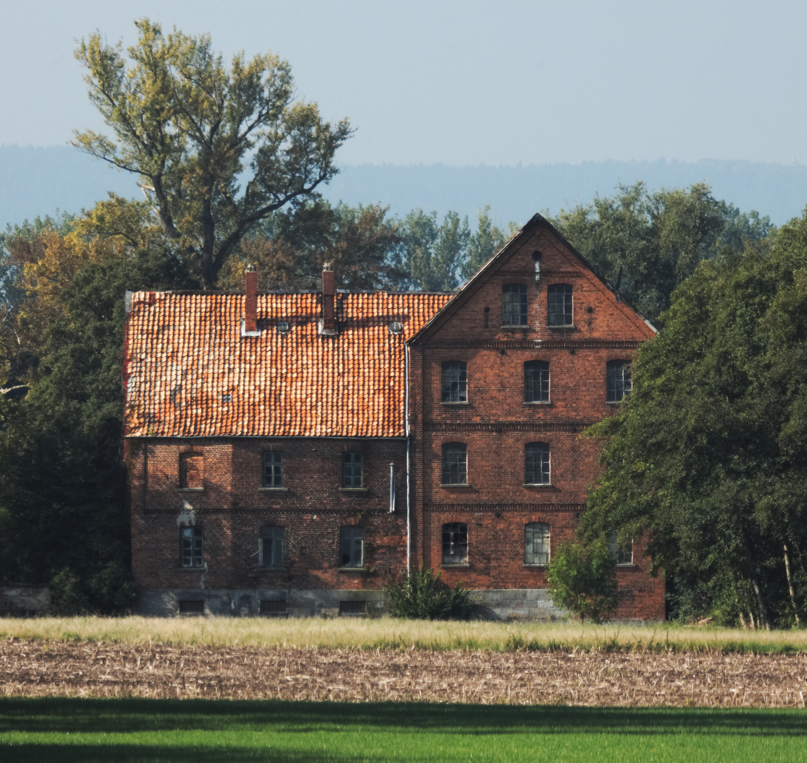 Die ehemalige Weizenmühle im Ronnenberger Stadtteil Vörie wurde 1957 stillgelegt. Das Gebäude steht seit Jahrzehnten leer. Bis zu seiner Deregulierung im Sommer 2011 floss der hier Landwehr genannte kanalisierte Oberlauf der Ihme durch das aus der Feldmark weithin sichtbare Gebäude.